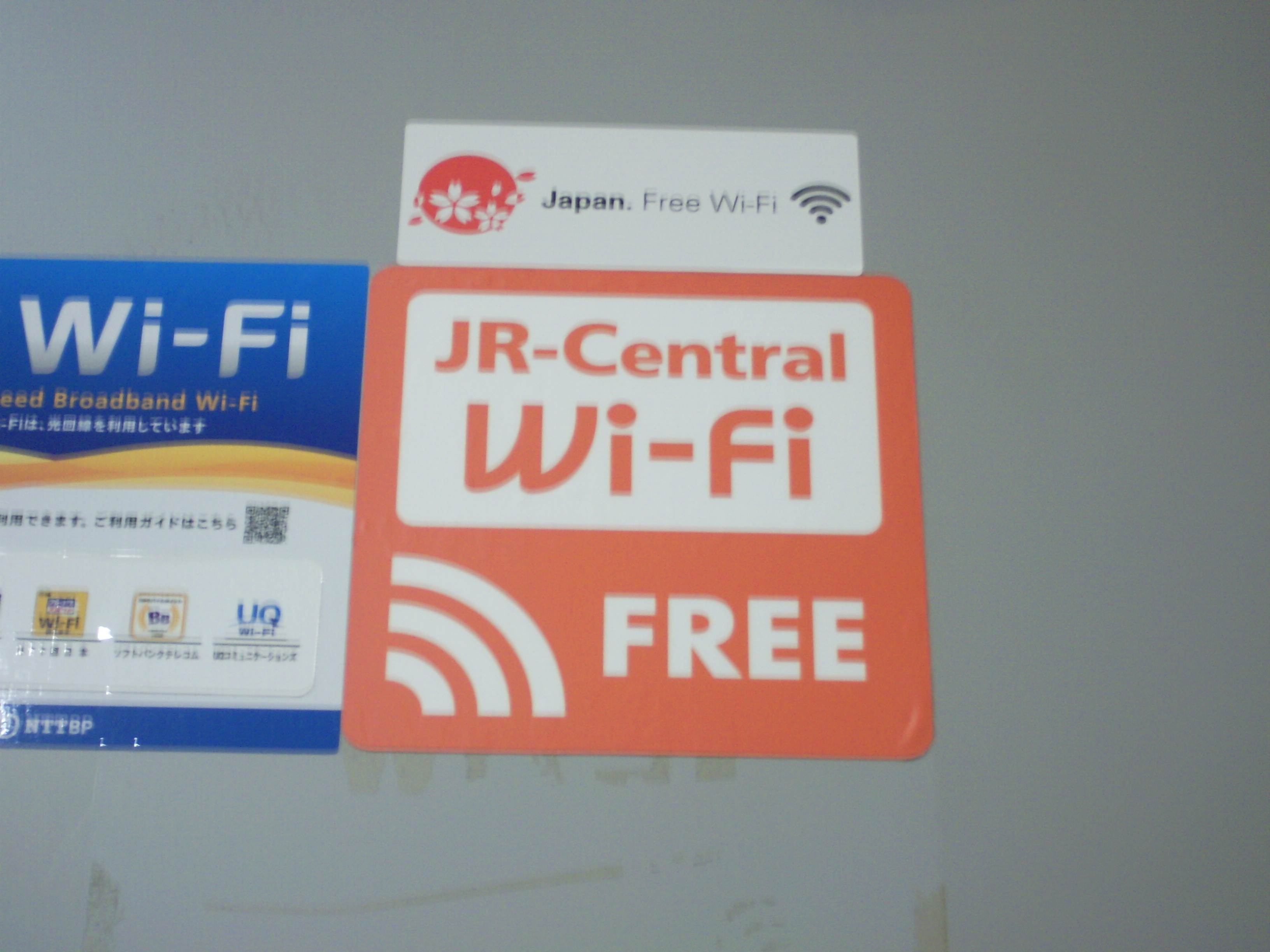 JR東海が東海道新幹線の主要駅待合室で提供するフリーWi-Fiのロゴシール ㊟カメラを起動すると日付機能が出荷時のものに初期化されるため、ファイル履歴の投稿日時とメタデータの原画像データの生成日時が異なります（本概要欄の下記日付が撮影日）